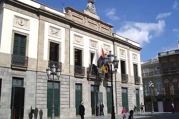 Teatro Guimerá, en Santa Cruz de Tenerife (Tenerife, España)